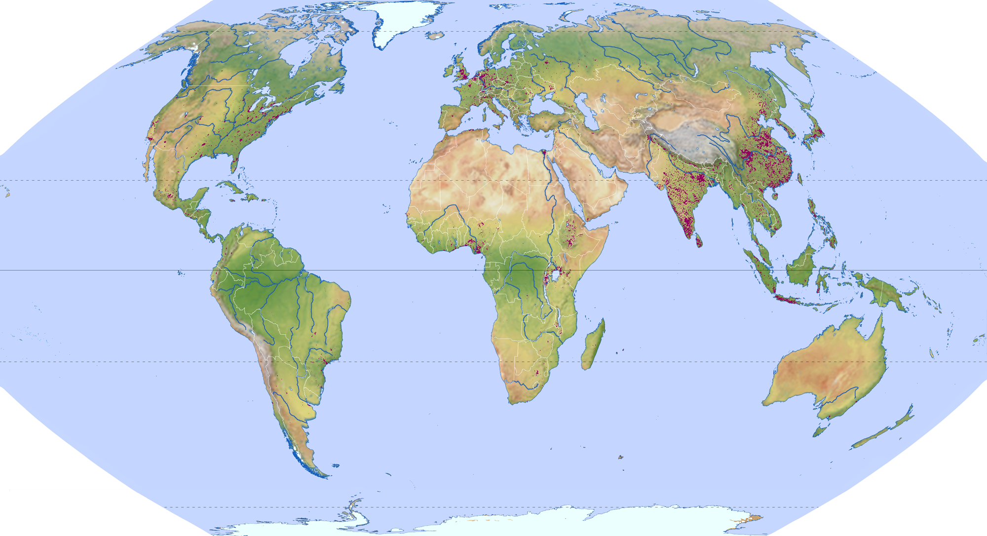 Weltkarte der Agglomerationen (Städtische Ballungszentren mit verdichtetem Umland)